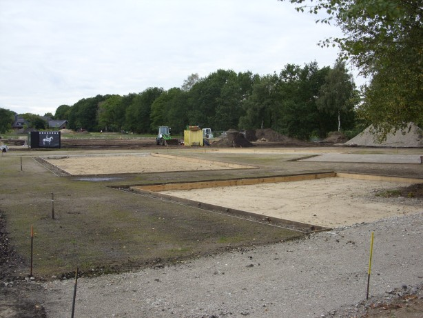 Landesgartenschau Norderstedt, Baustelle der Themengärten im Feldpark